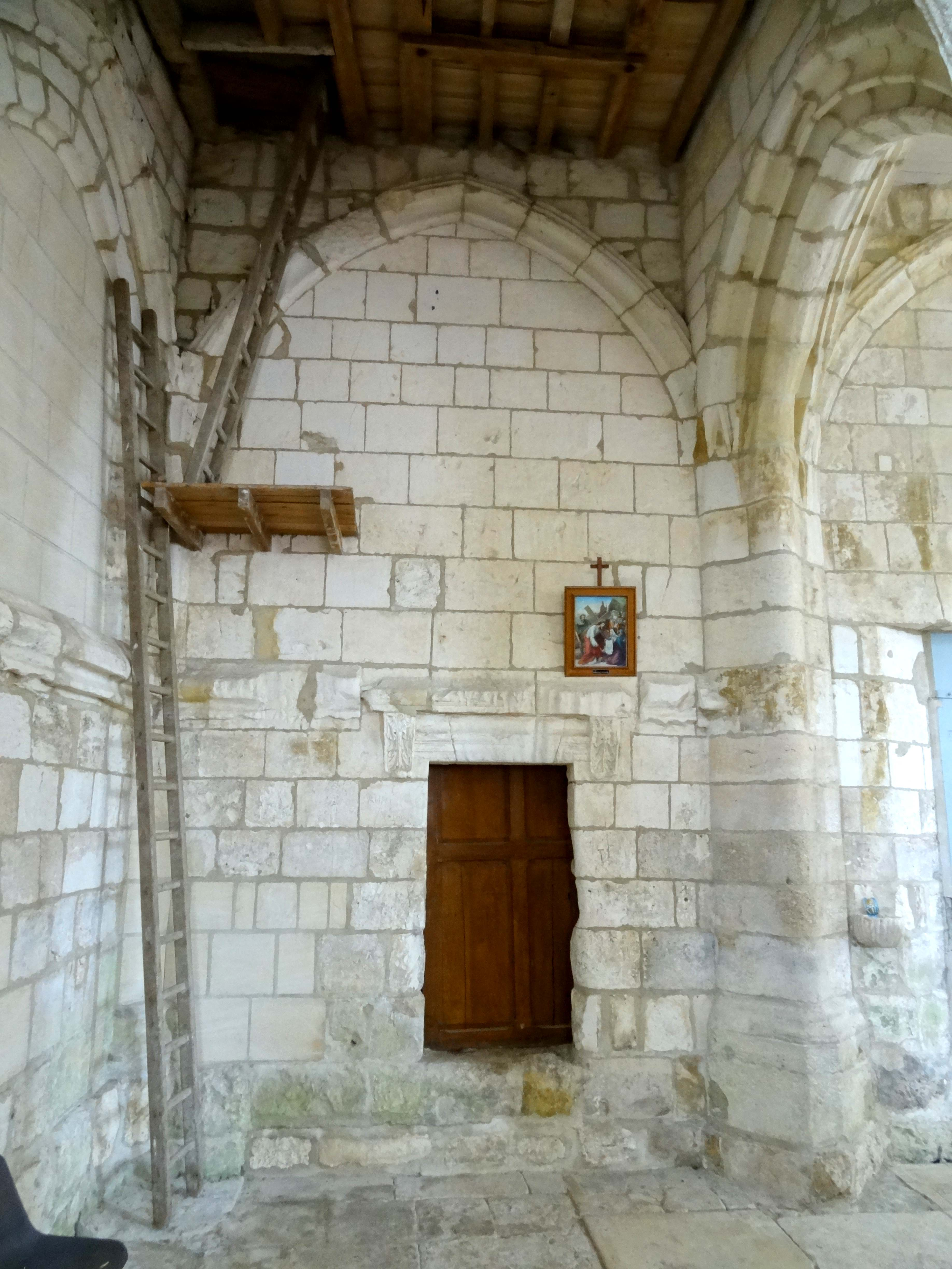 Intérieur de l'église - voir titre.